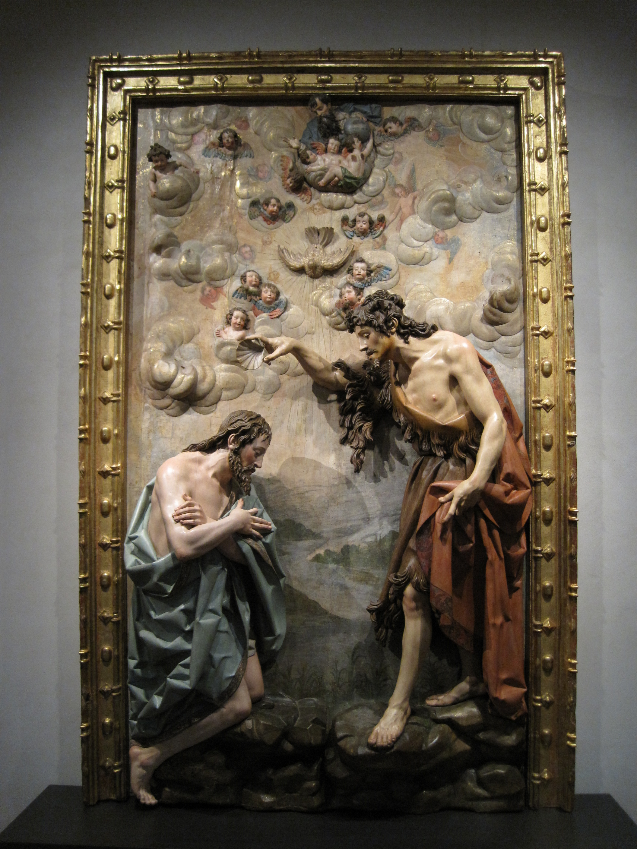 Bautismo de Cristo (1624-1628), obra de Gregorio Fernández. Procede del convento de Nuestra Señora del Consuelo de Valladolid. Museo Nacional Colegio de San Gregorio, Valladolid (España).